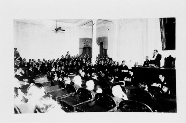 El flamante gobernador de Tucumán, Miguel Campero se dirige a la Legislatura Provincial luego de jurar su cargo en mayo de 1924.